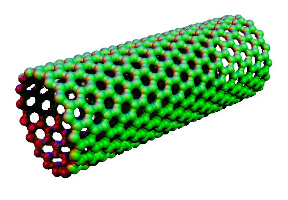 see name